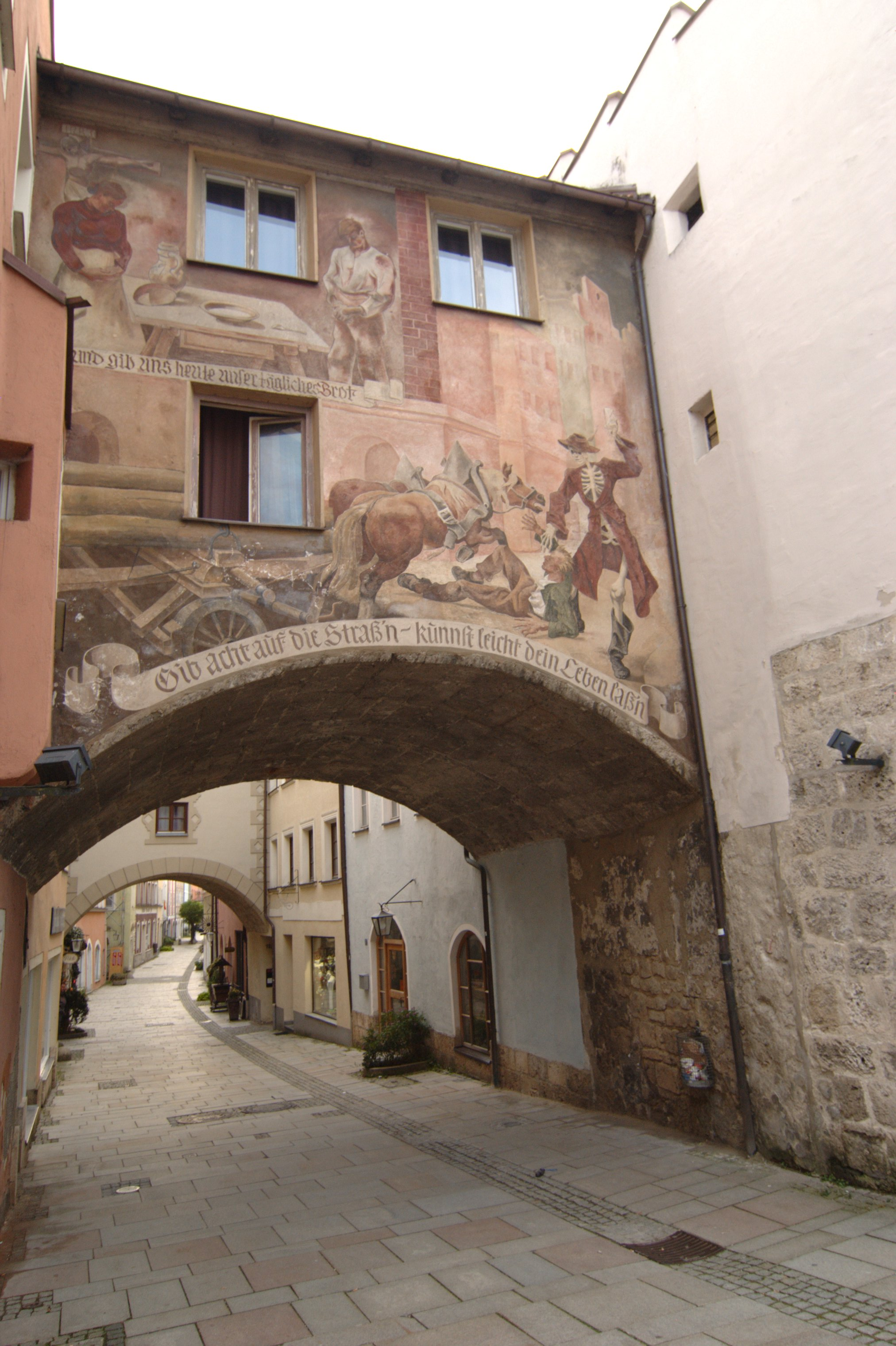 Ehemaliges Handwerkerhaus (rechts, hellblaue Fassade) mit Straßenbogen, darauf FreskoThis is a photograph of an architectural monument.